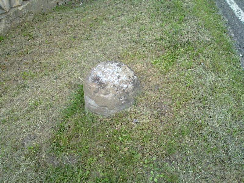 Preußischer Viertelmeilenstein Glockenform in Reuden